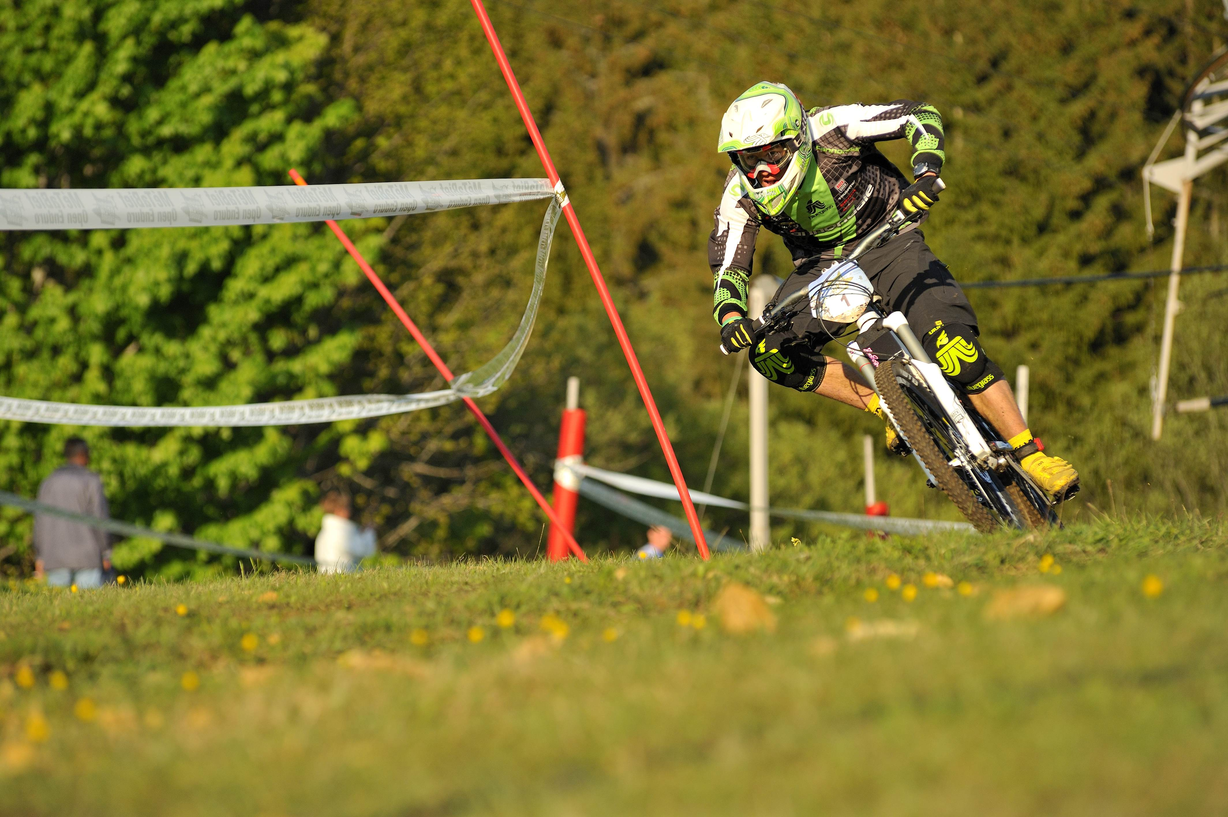 photo représentant le VTT d'Enduro